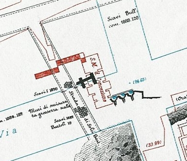 Pianta di Lanciani